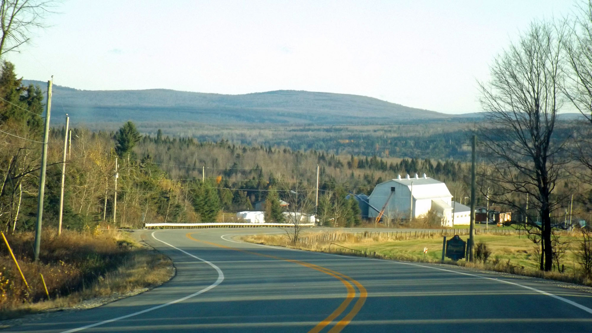 Route 108 et ferme